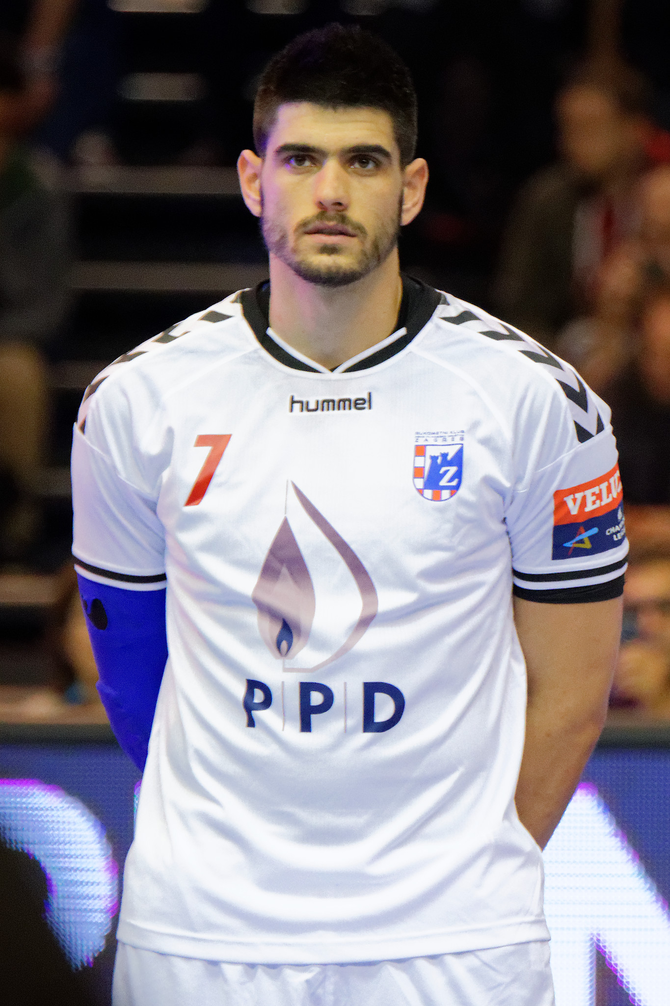 Rencontre de phase de groupe de la ligue des champions 2015-16 entre le PSG et le RK Zagreb. A la Halle Carpentier (Paris), le 11 ocotbre 2015.